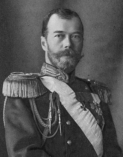 Nicolás II de Rusia, 1913.